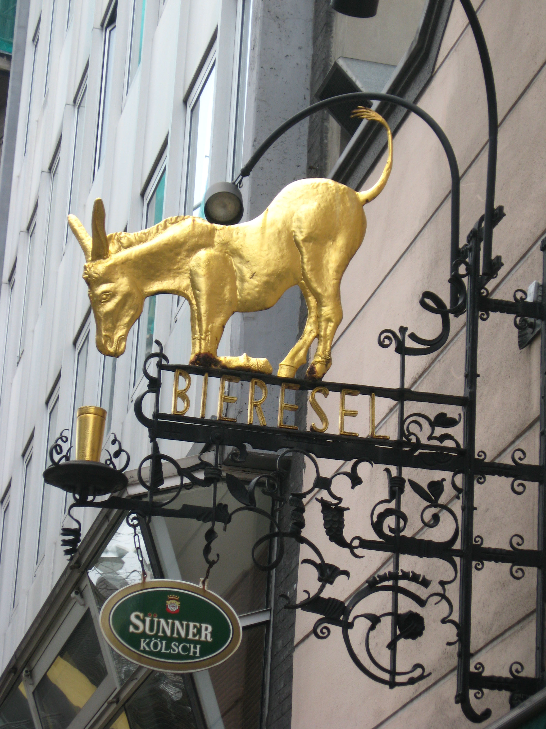 Kölns ältestest Muschelhaus "Bieresel" (Gaststätte seit 1297) Datum: 21.01.2011 Urheber: B. Neulich alias Benutzer:Neulich im Roxy Kino Quelle: Privates Fotoarchiv des Urhebers